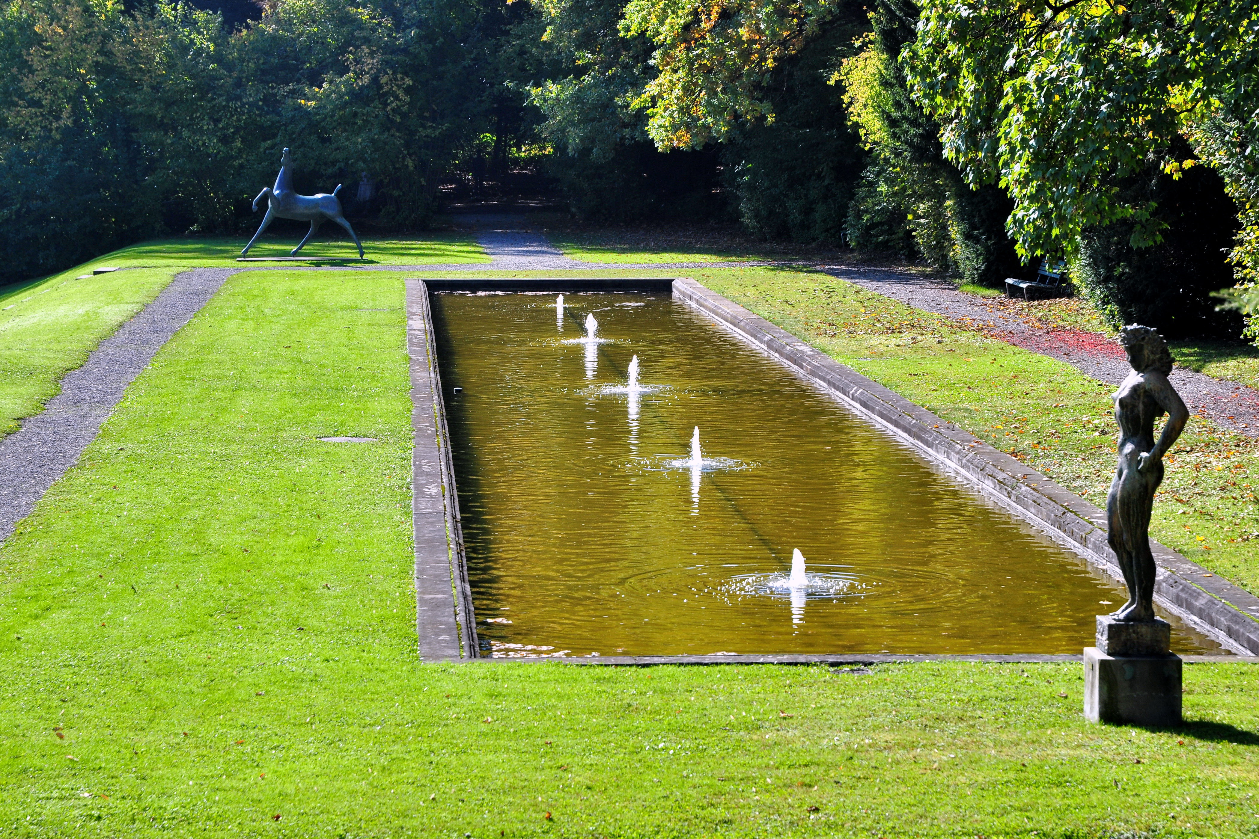 Muraltengut, Seestrasse 201, 203 in Zürich-Wollishofen (Switzerland)